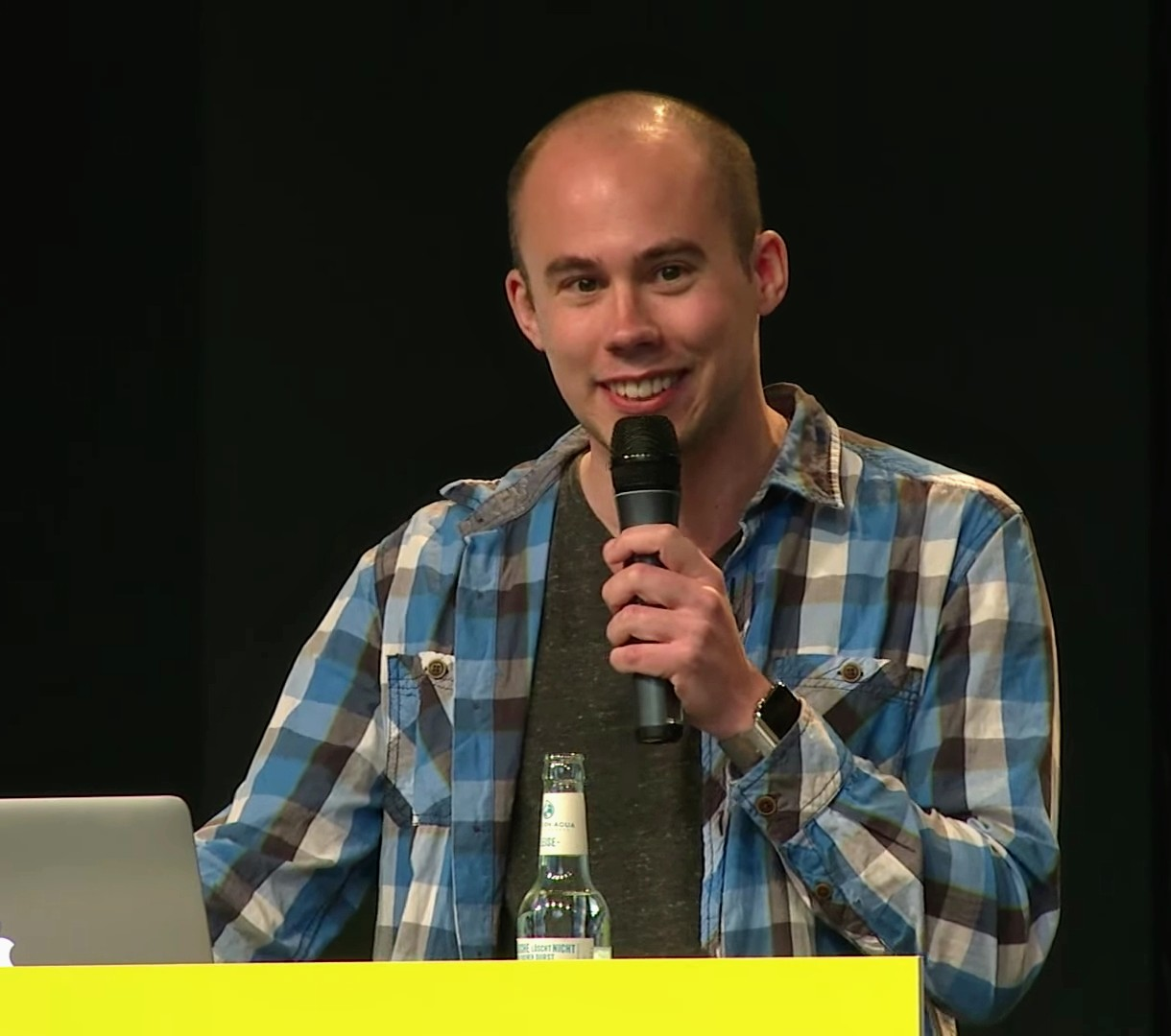 Find out more at: Heiko Maas, Bundesjustizminister, twitterte noch im Dezember 2014, dass er einen neuen Anlauf zur Vorratsdatenspeicherung in Deutschland ablehne. Vor wenigen Wochen erschien dann aus seinem Ministerium ein neuer Entwurf. Doch steht seine Partei, die SPD, eigentlich hinter der Vorratsdatenspeicherung? Auf dem Parteikonvent im Juni kann die Entscheidung fallen, ob es eine VDS geben wird oder ob die Parteibasis rebelliert. Was getan werden kann, um die VDS endlich zu begraben. Henning Tillmann Creative Commons Attribution-ShareAlike 3.0 Germany (CC BY-SA 3.0 DE)